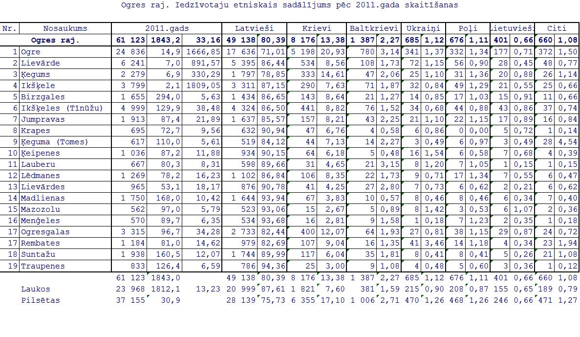 Latvijas 2011 gada tautas skaitīšanas dati